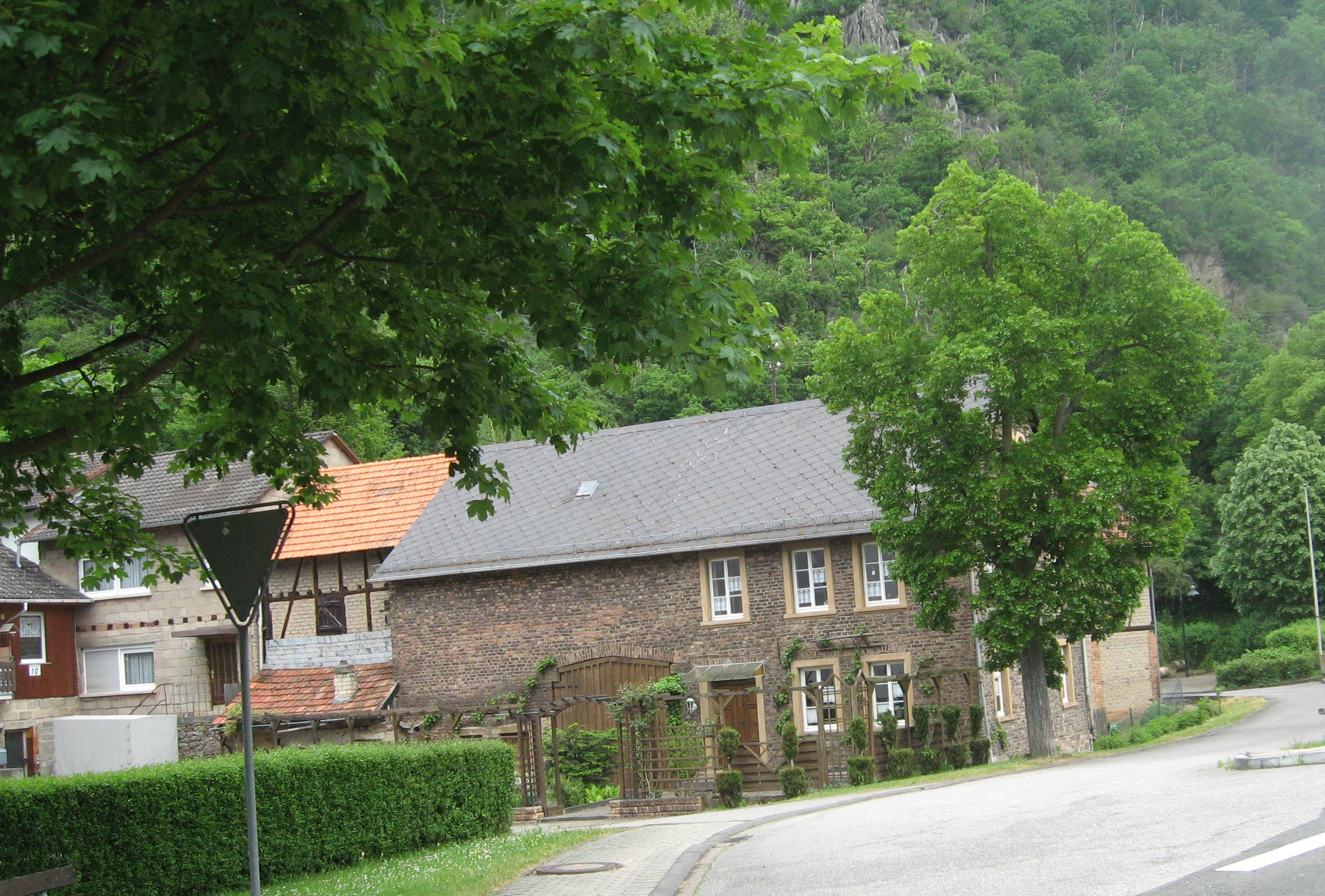 Village Kellenbach in the Hunsrück landscape, Germany